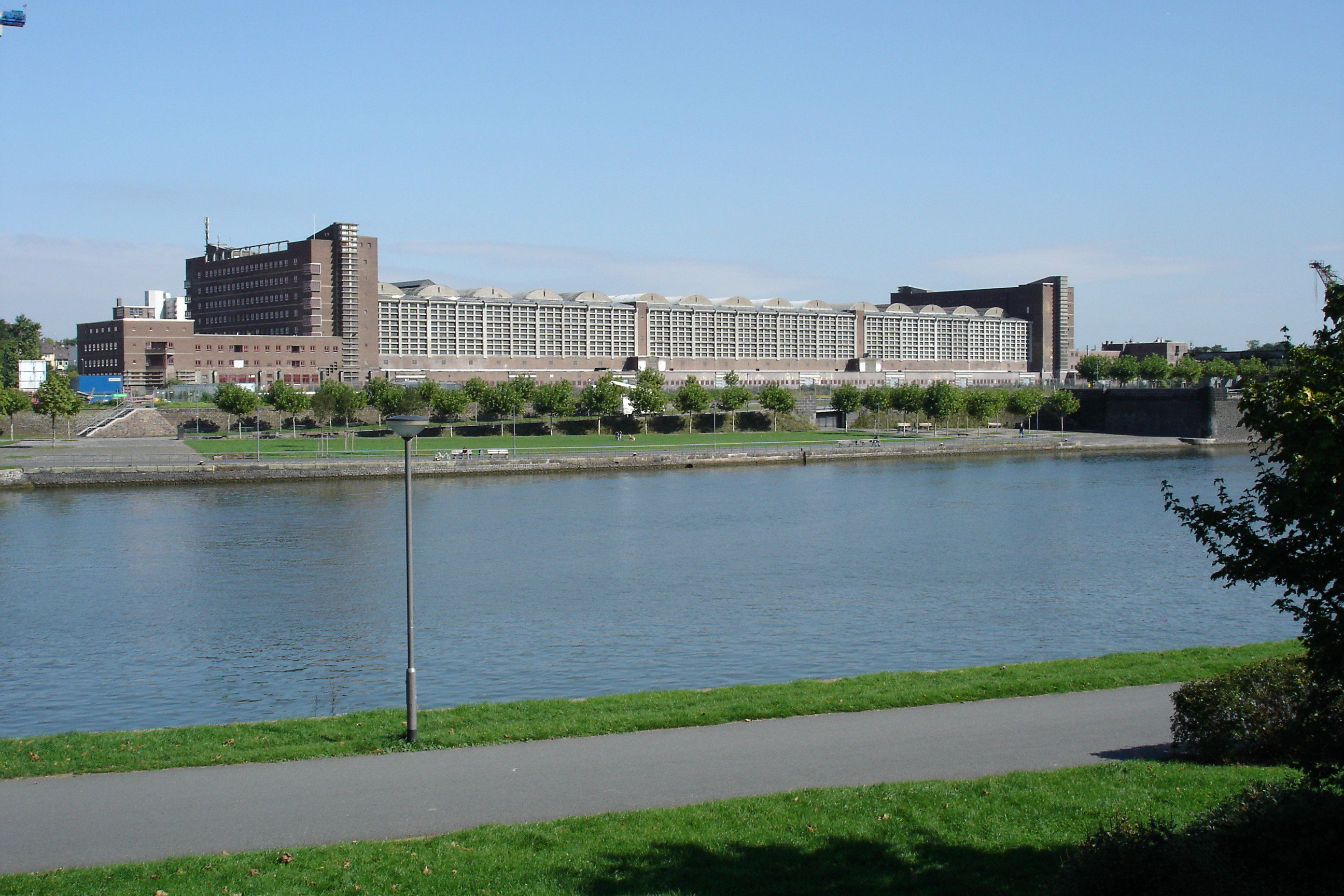 ehemalige Grossmarkthalle in Ffm